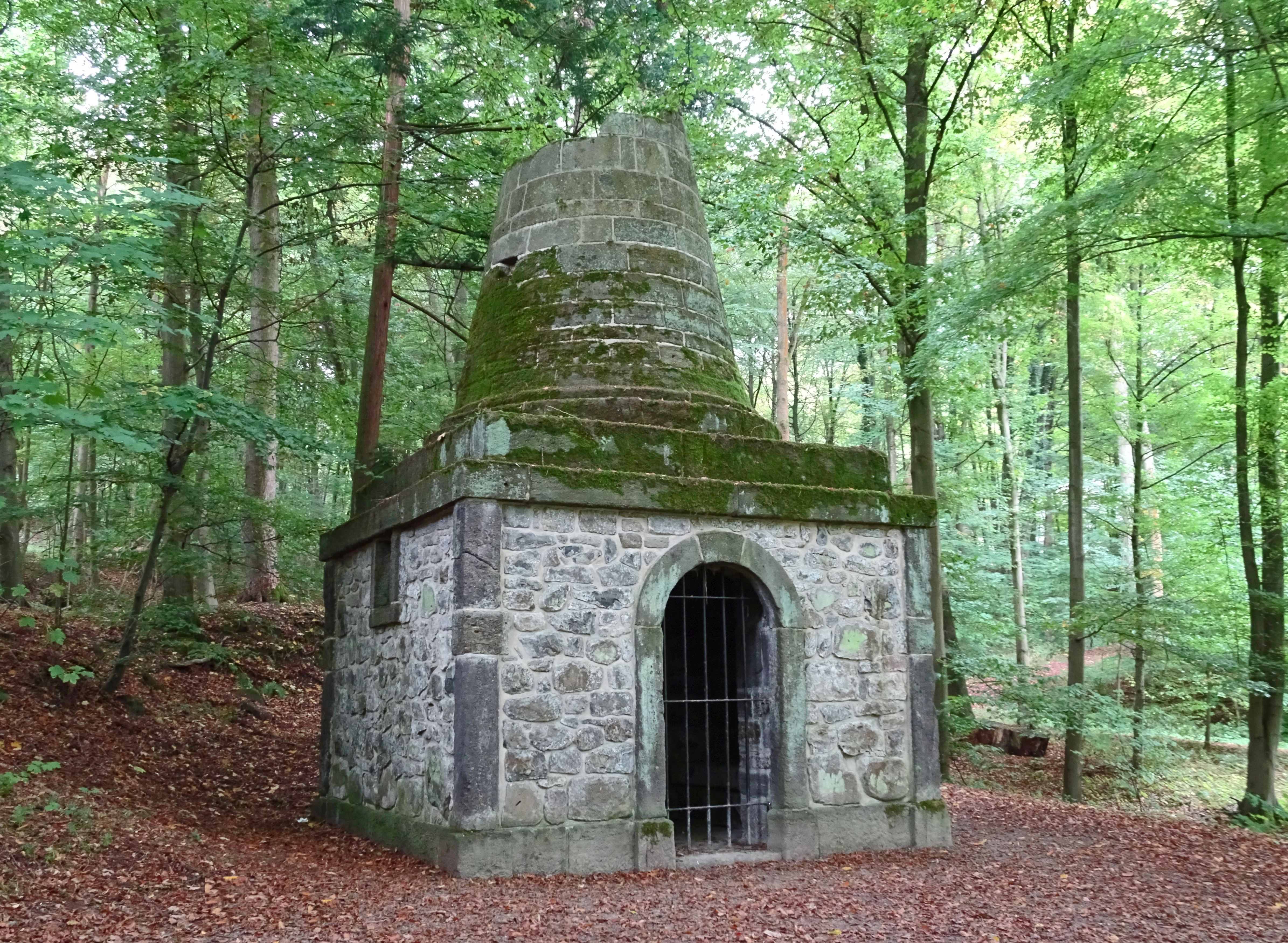 Bergpark Wilhelmshoehe in Kassel: Grabmal des Vergil